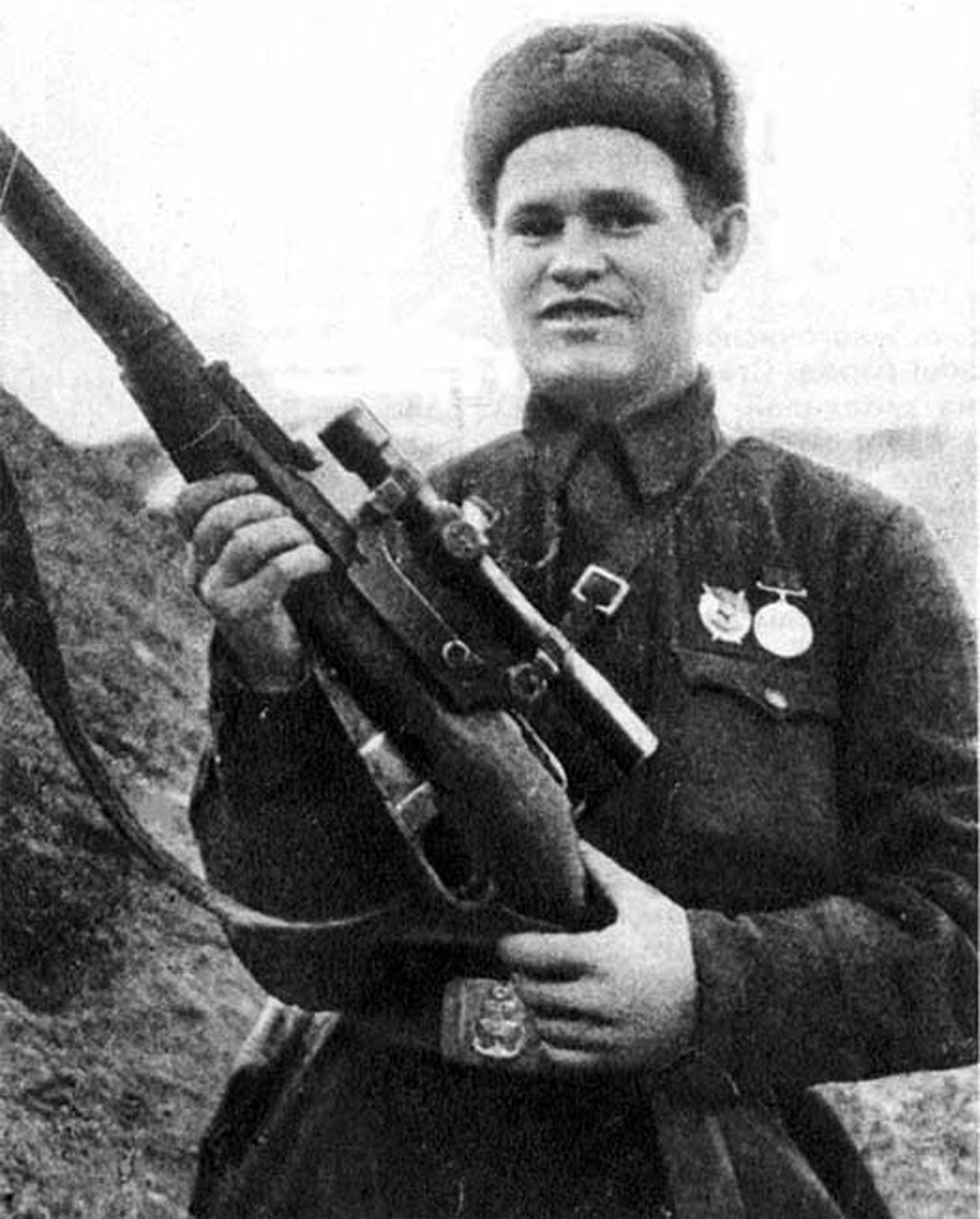 Василий Григорьевич Зайцев (1915 — 1991) — снайпер 62-й армии Сталинградского фронта, Герой Советского Союза